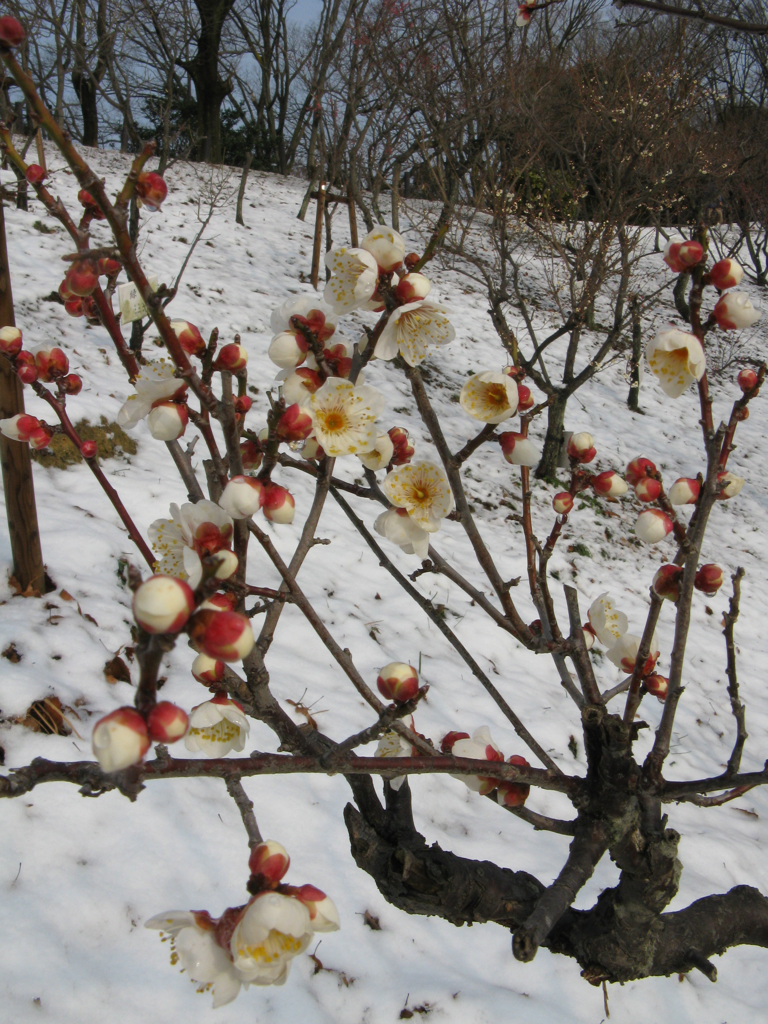 Prunus mume 'Tojibai'